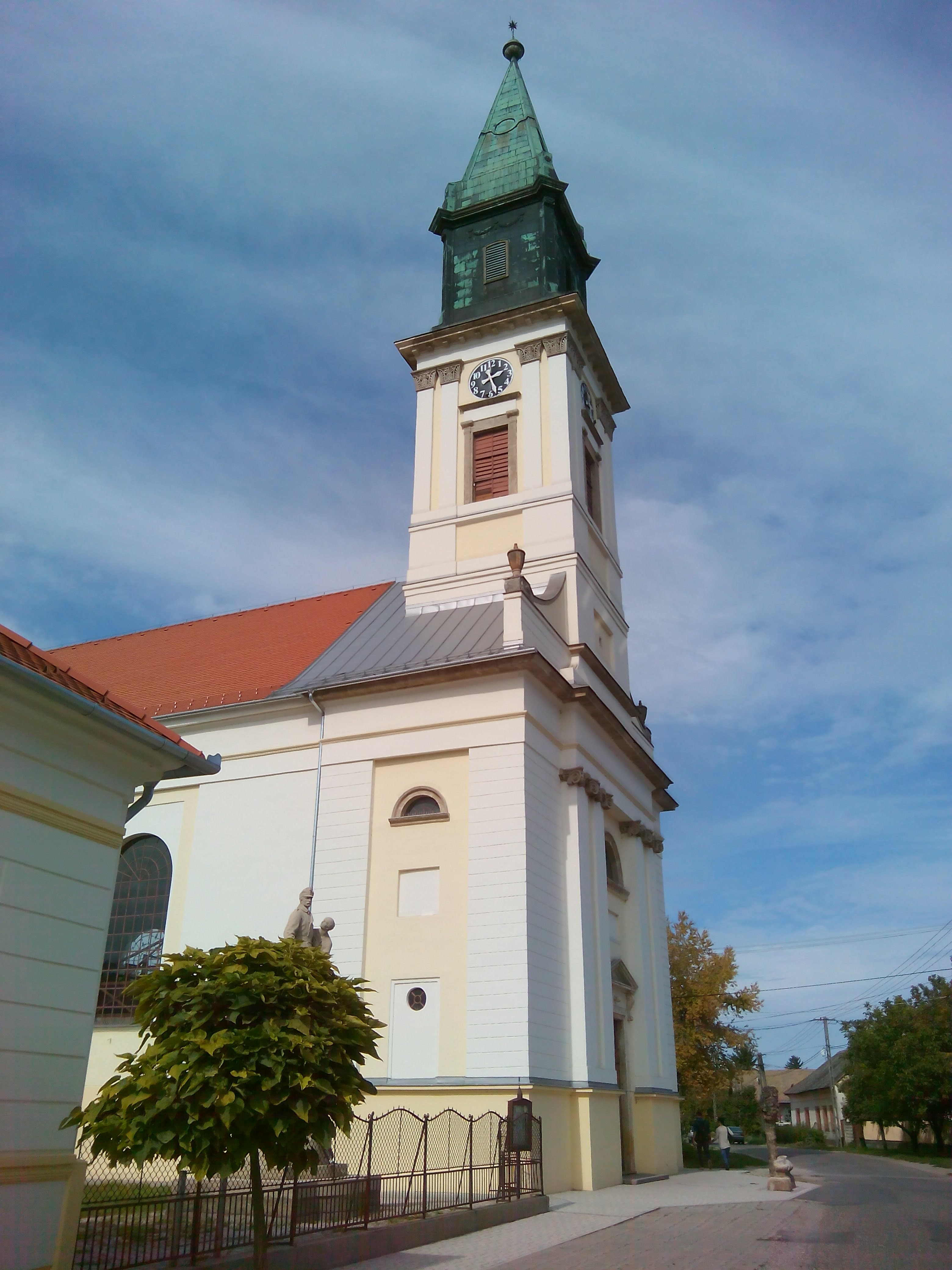 Kiskunlacháza Református templom